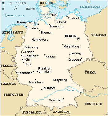 Ovu sam sliku napravio na temelju CIA-ine slike u javnom vlasniÅ¡tvu. --Zmaj 16:18, 1. lipanj 2007. (CEST)